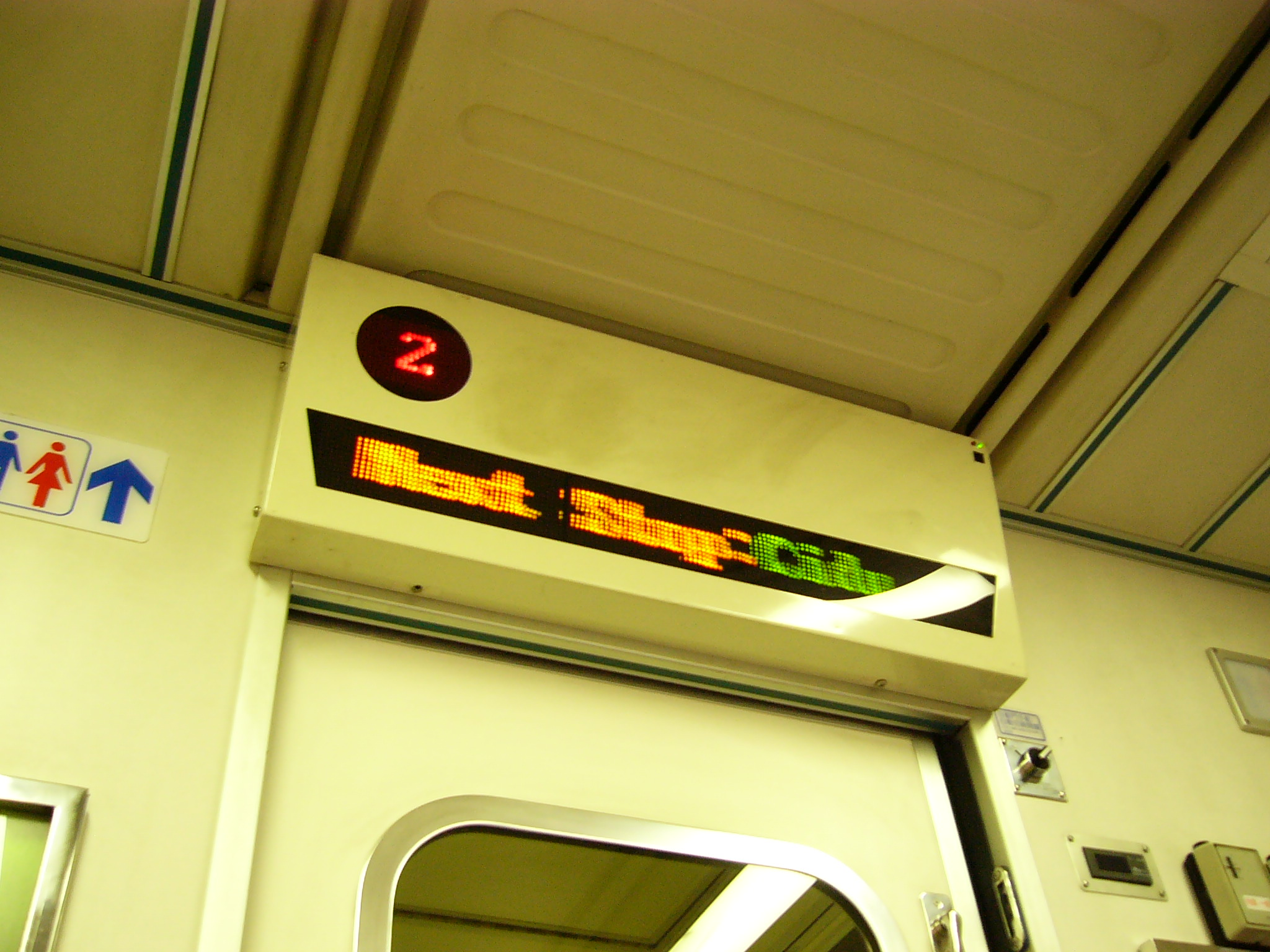 台鐵EMU1200型電聯車的車內LED旅客資訊顯示器。